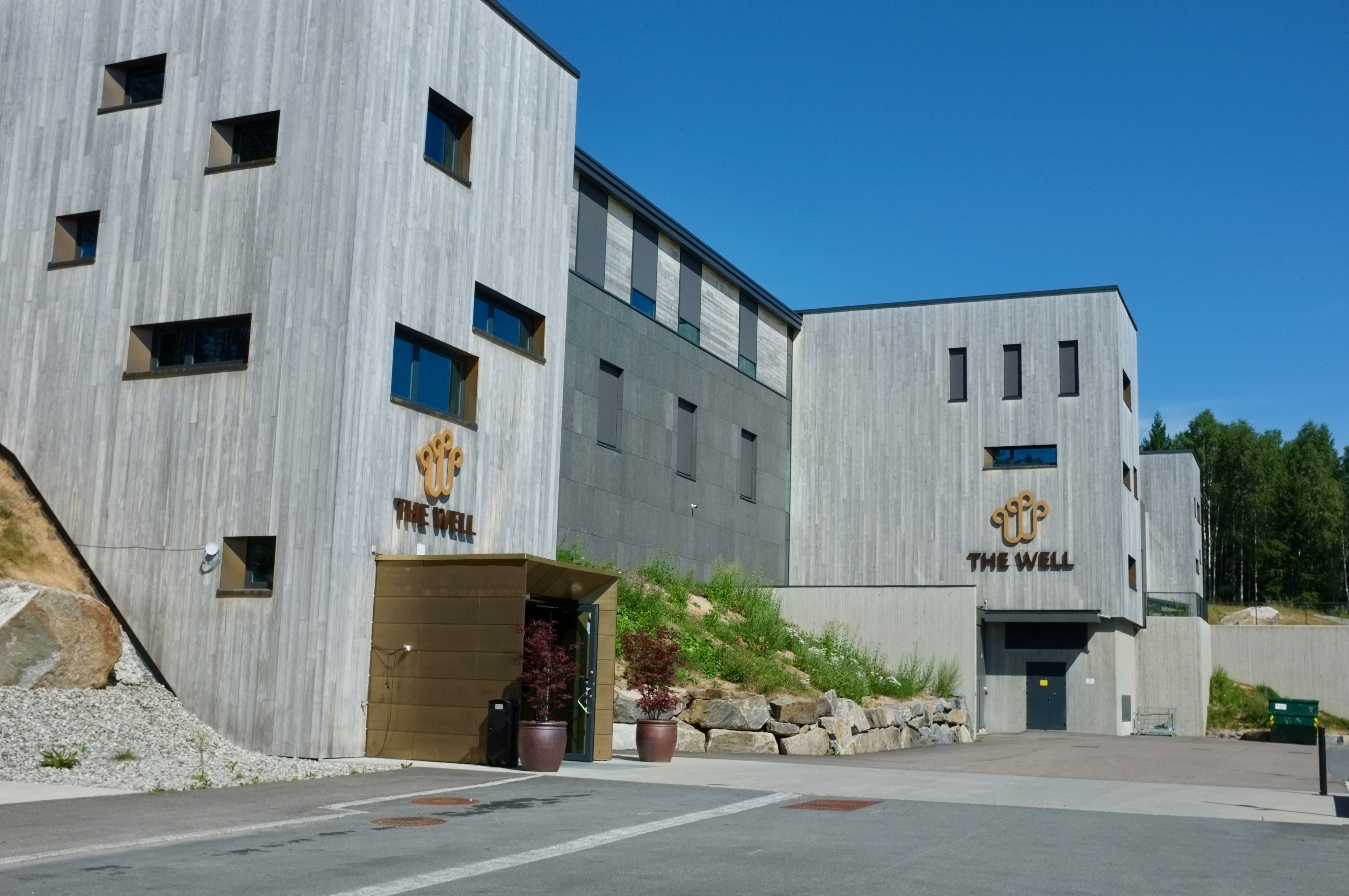 The Well, et spa- og velværesenter på Kolbotn i Akershus.